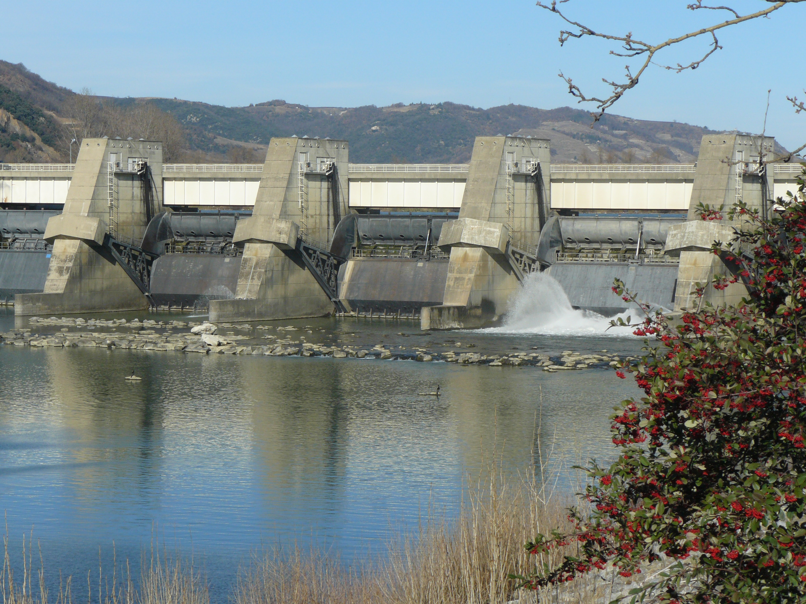 construit sur la terre ferme , avant de voir le lit du Rhône détourné dans ses piles